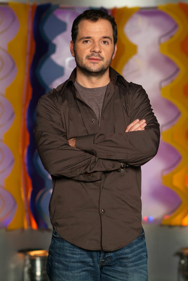 El cómico y presentador Ángel Martín.